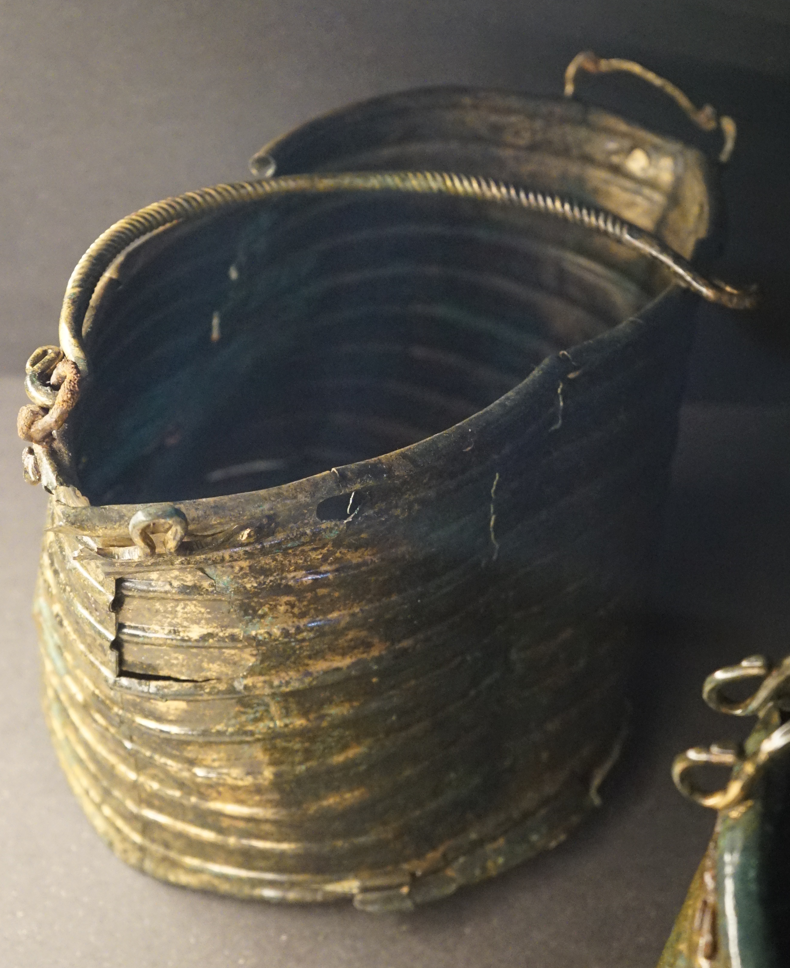 ciste en bronze.